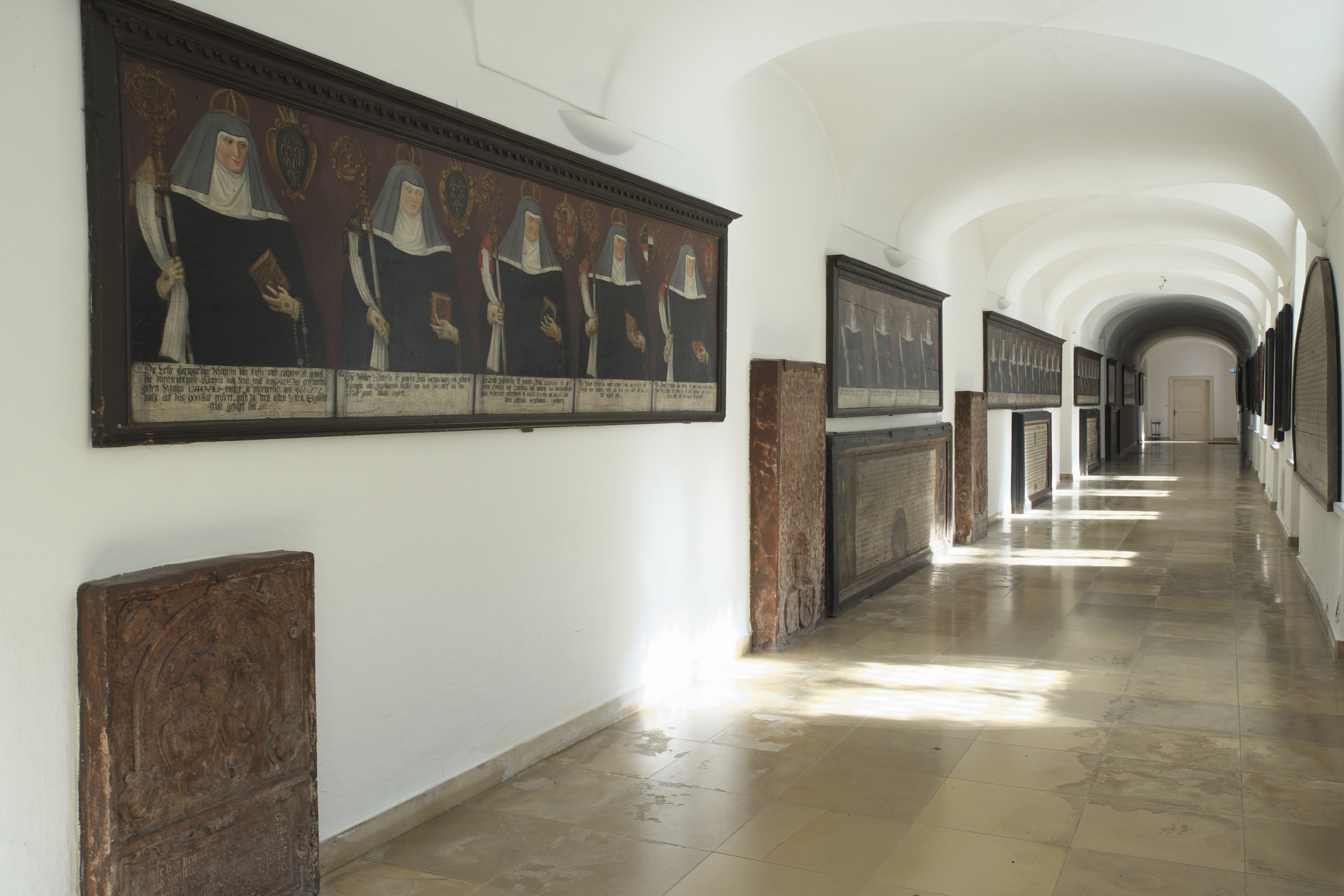 Äbtissinnengang des Benediktinerinnenklosters Frauenchiemsee auf der Fraueninsel im Landkreis Rosenheim (Bayern/Deutschland)